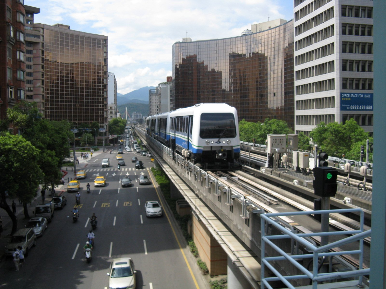 台北捷運CITYFLO650型電聯車（内湖線中山中学校駅松山空港方にて）